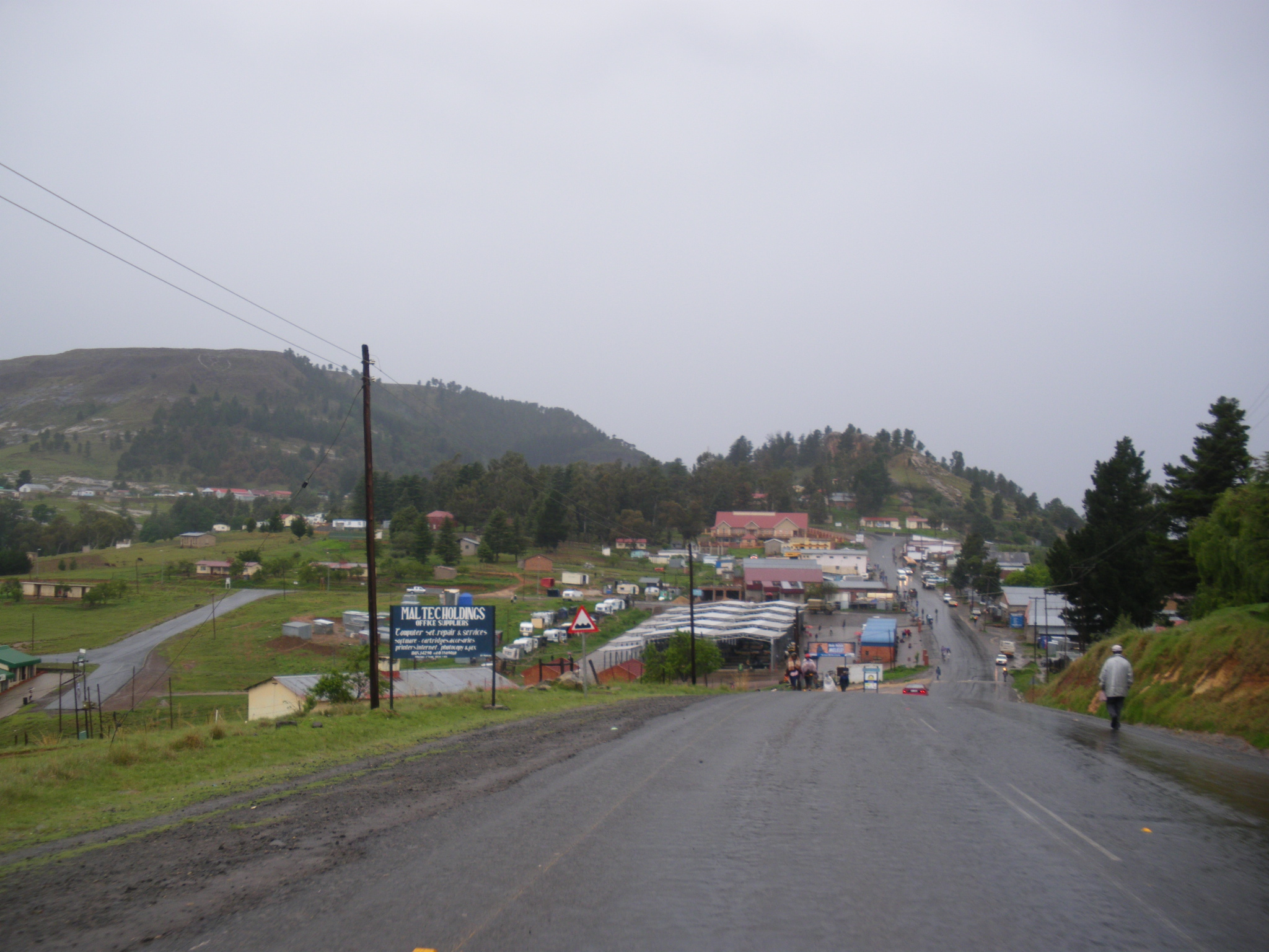 Col de montagne du Qacha's Pass entre le Lésotho et l'Afrique du Sud